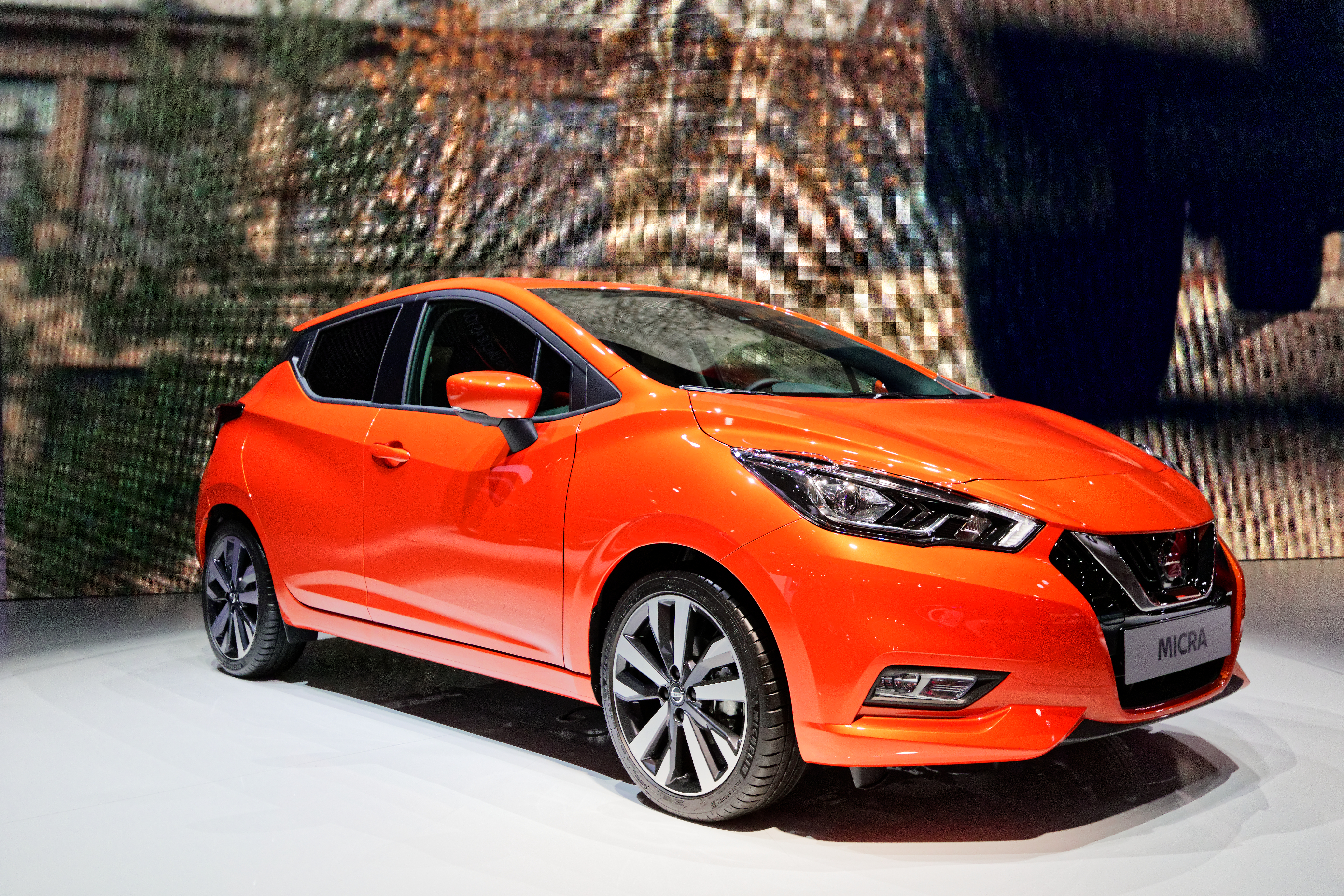 Une Nissan Micra présentée lors du mondial de l'automobile de Paris 2016.